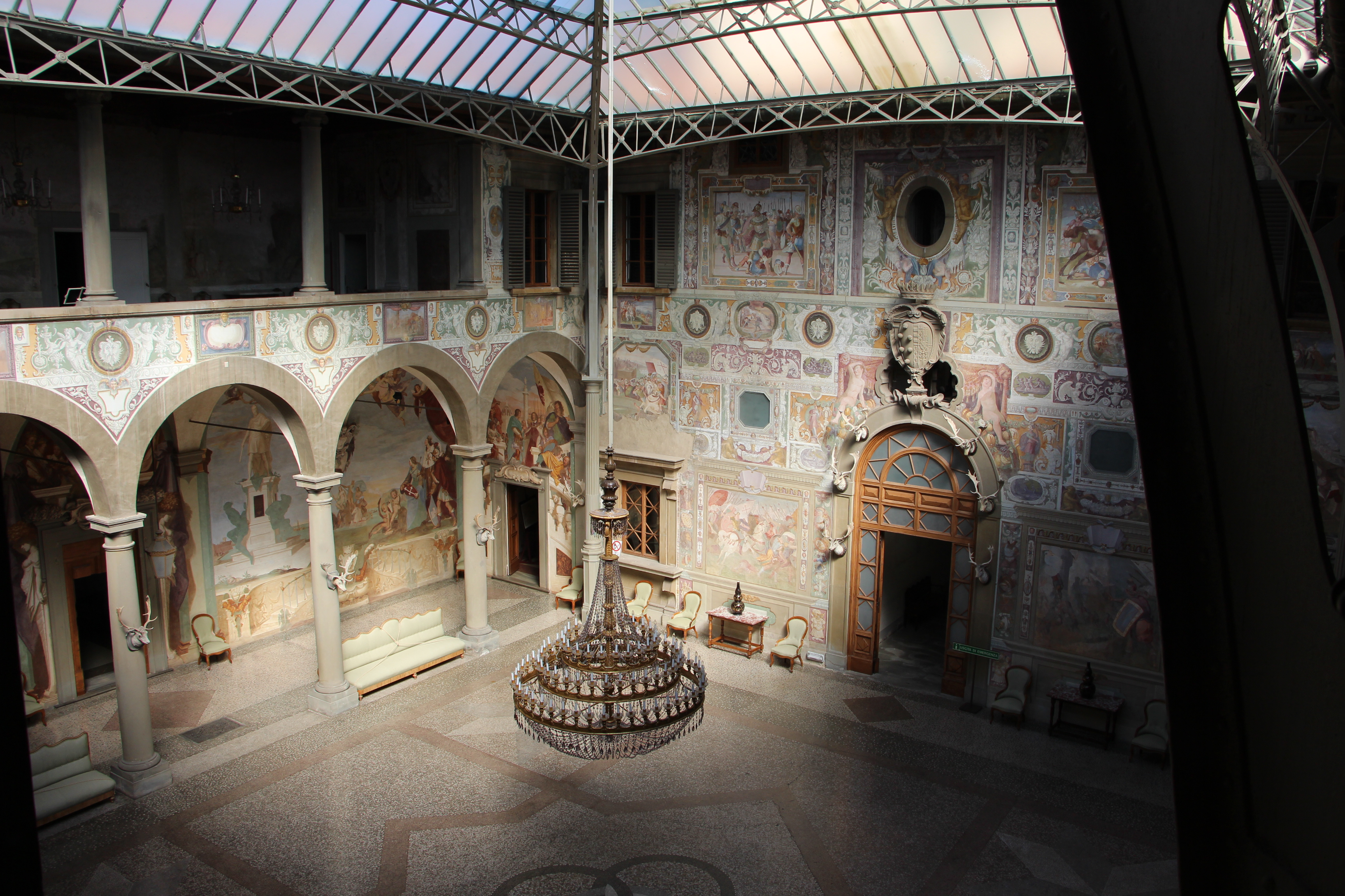 Villa medicea della Petraia - MIBAC This is a photo of a monument which is part of cultural heritage of Italy.